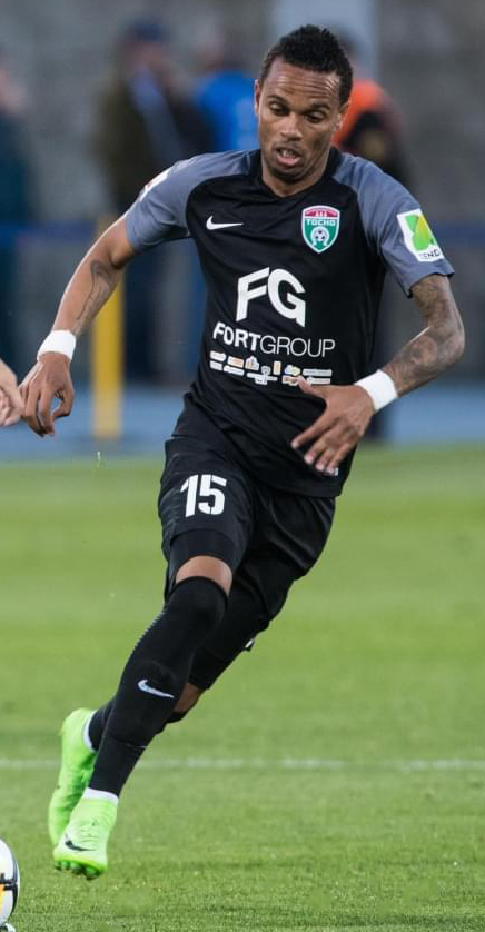 30.07.17. Россия, Санкт-Петербург, Петровский, Большая арена. РОСГОССТРАХ – Чемпионат России 2017/2018, 3-й тур, «Тосно» — «Зенит».